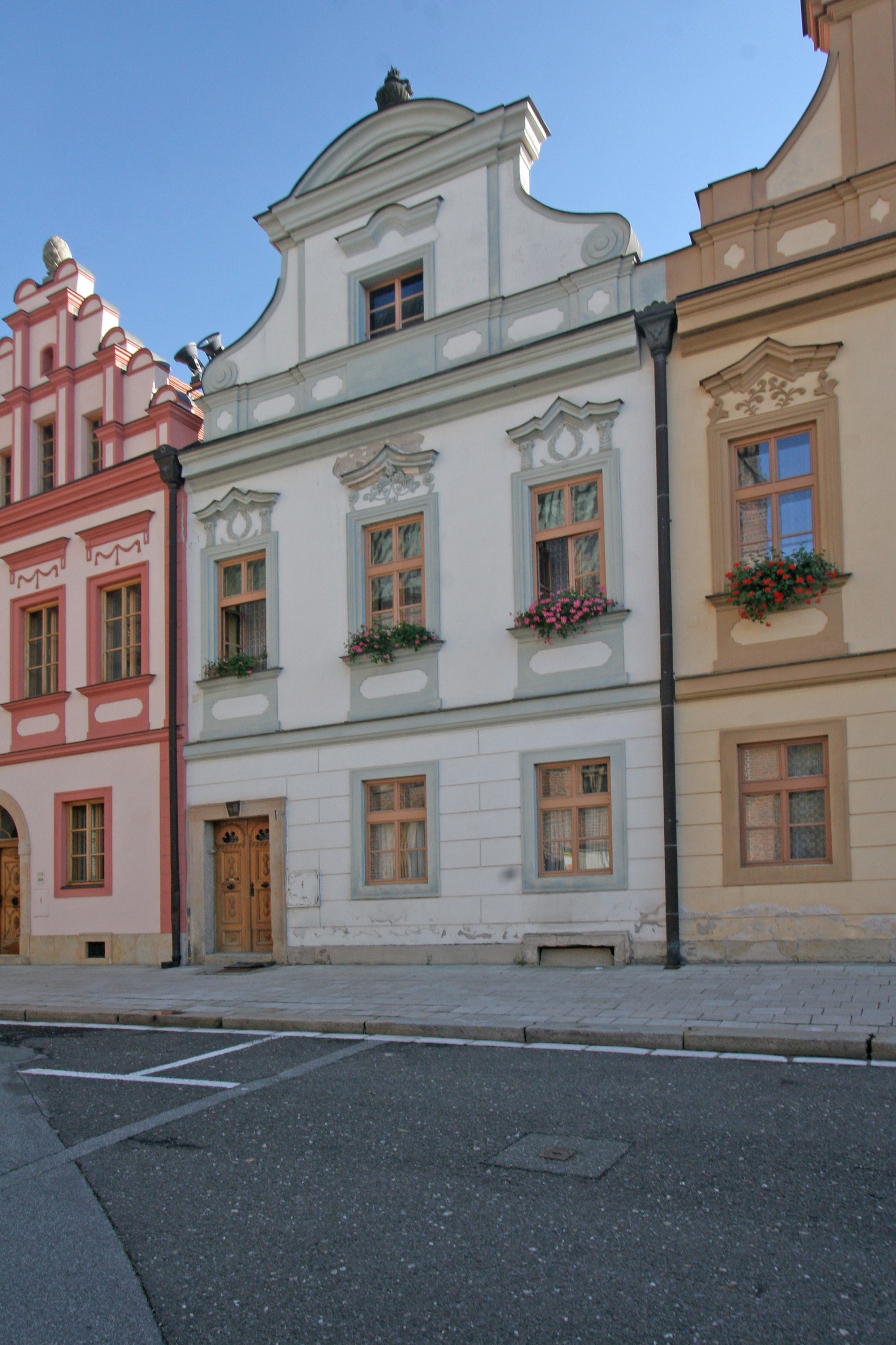 Kanovnický dům (Hradec Králové), Karla Tomana 48/2, Hradec Králové